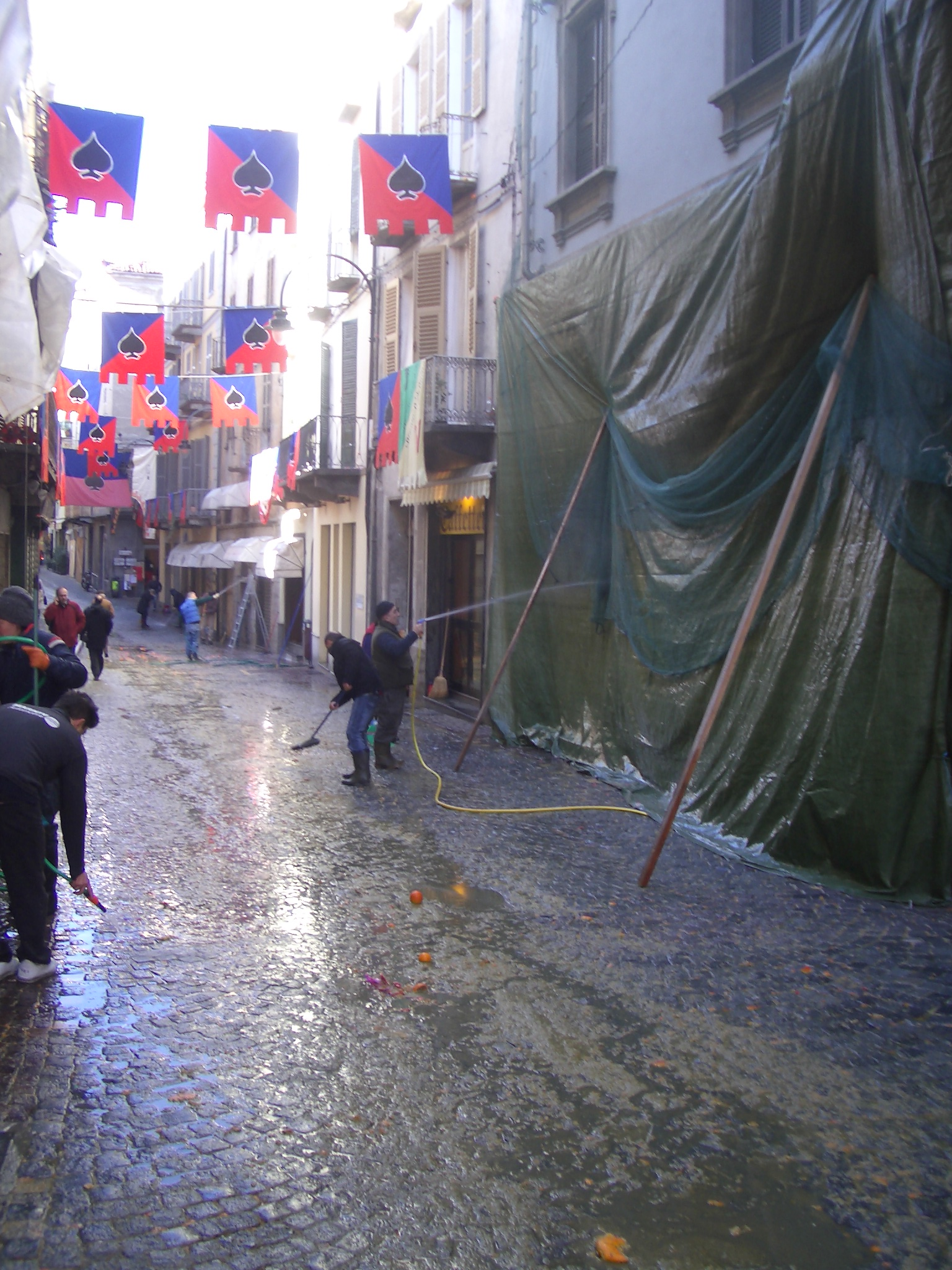 Carnival of Ivrea, Il giorno dopo; pulizia della città (The “day after”; town cleaning)